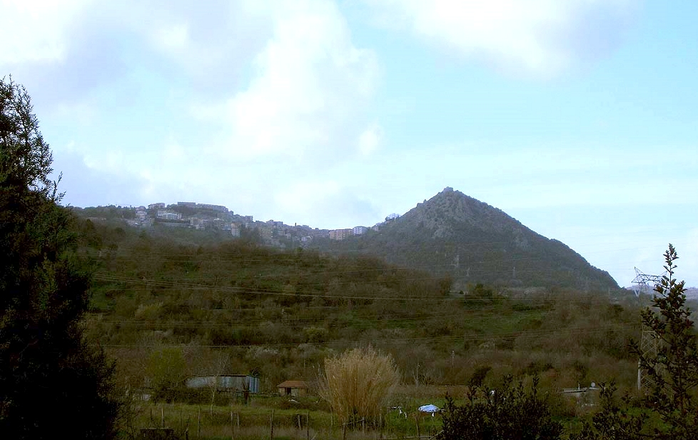 Panorama di Tolfa RM